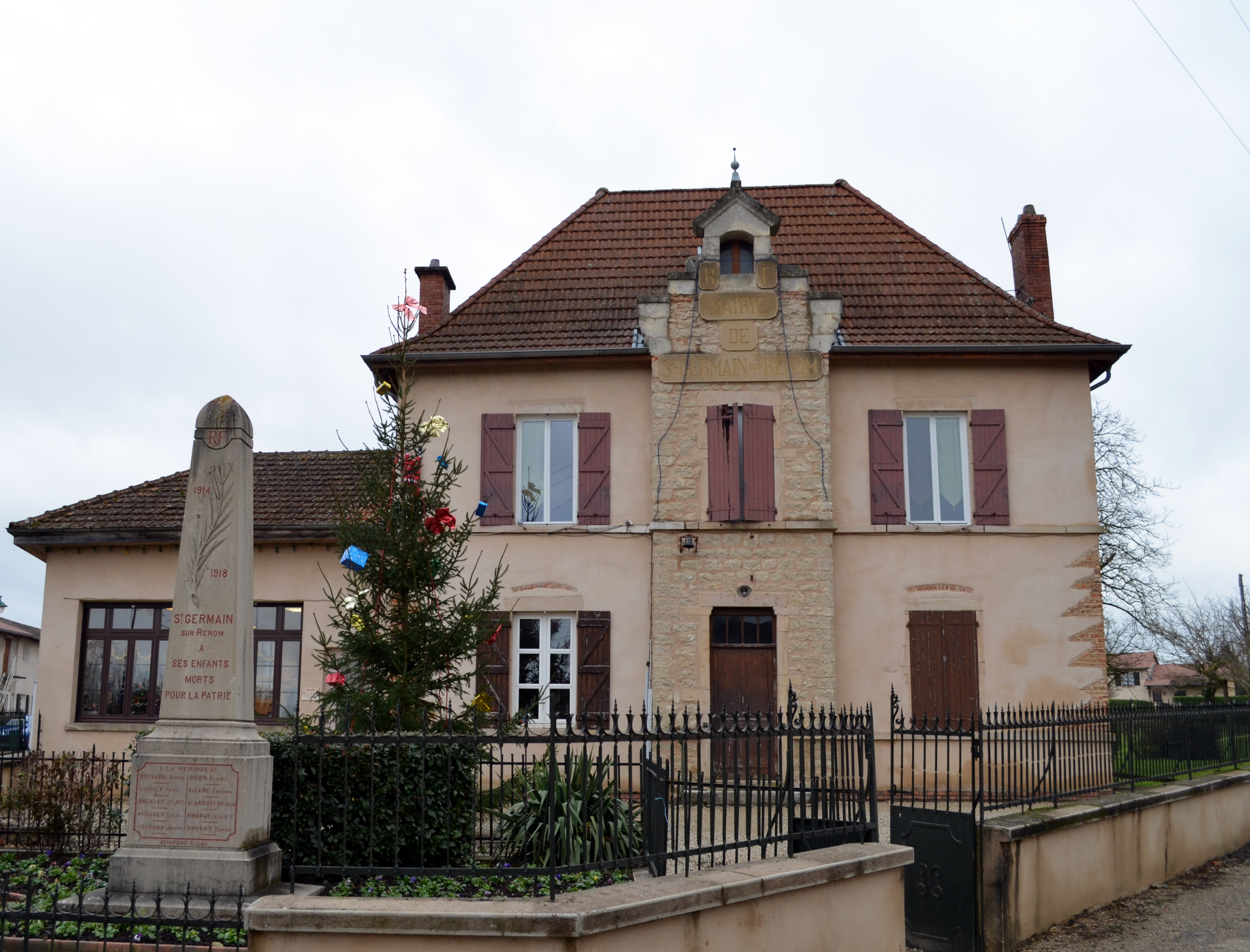 Mairie et monument aux morts de Saint-Germain-sur-Renon.